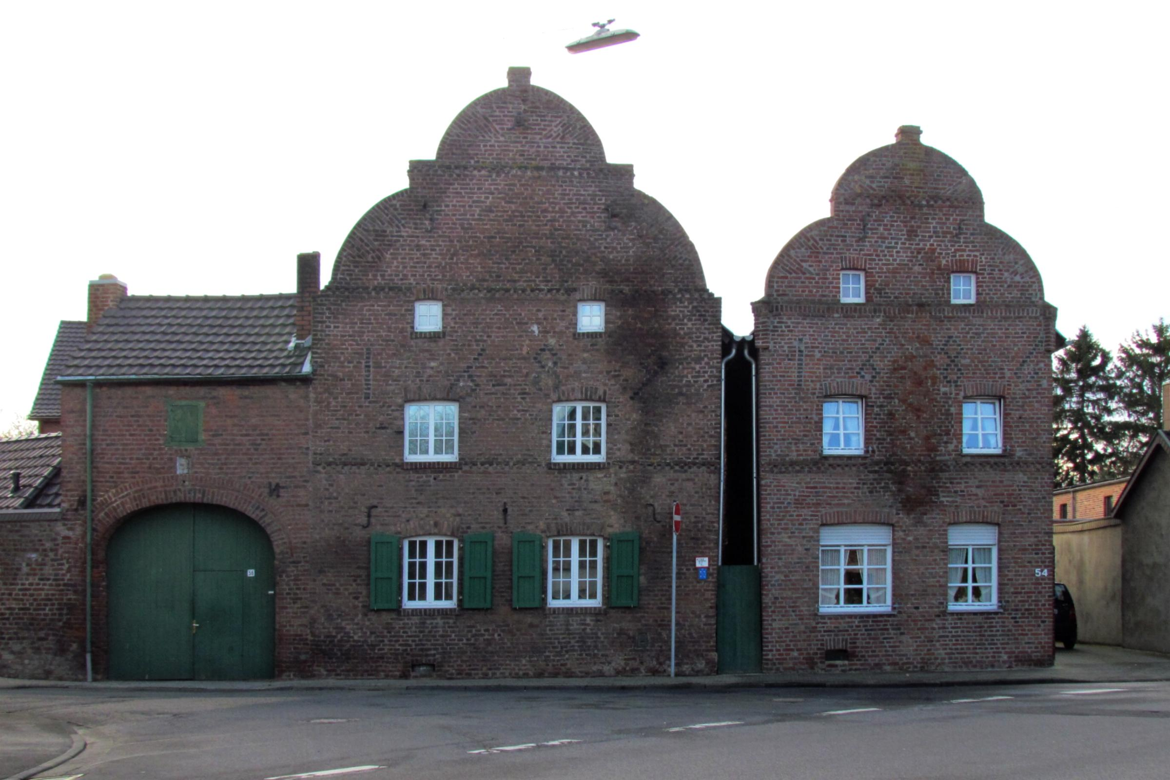 Giebelhäuser aus den Jahren 1682 und 1686, Dürener Straße 54 und 56, Geilenkirchen-Immendorf